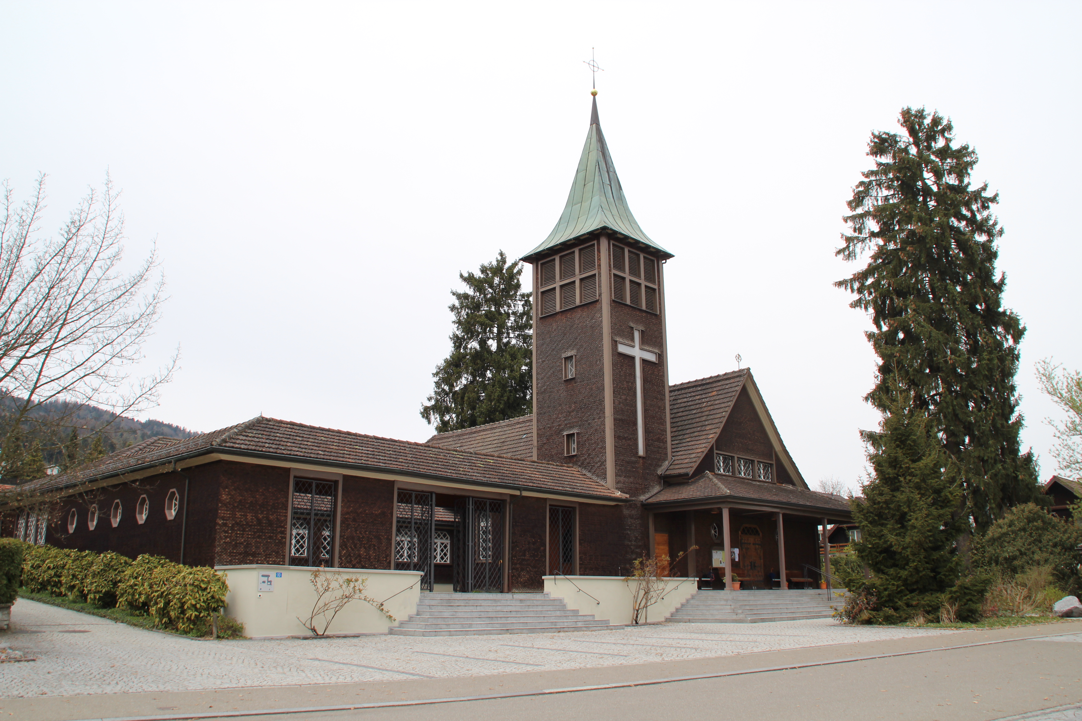 St.-Antonius-Kirche (Egg ZH) Aussenansicht